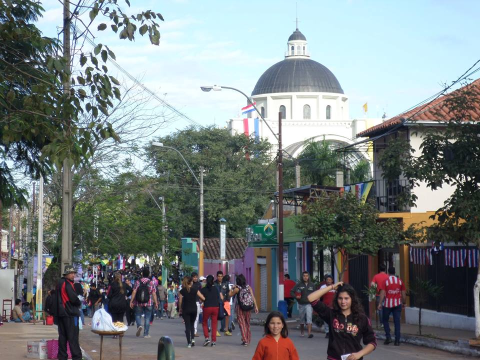 Vista de la Basílica de Caacupé antes de la misa oficiada por el Papa Francisco, el sábado 11 de julio de 2015.